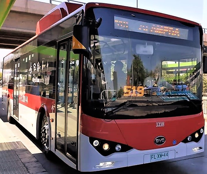 Bus Transantiago eléctrico BYD